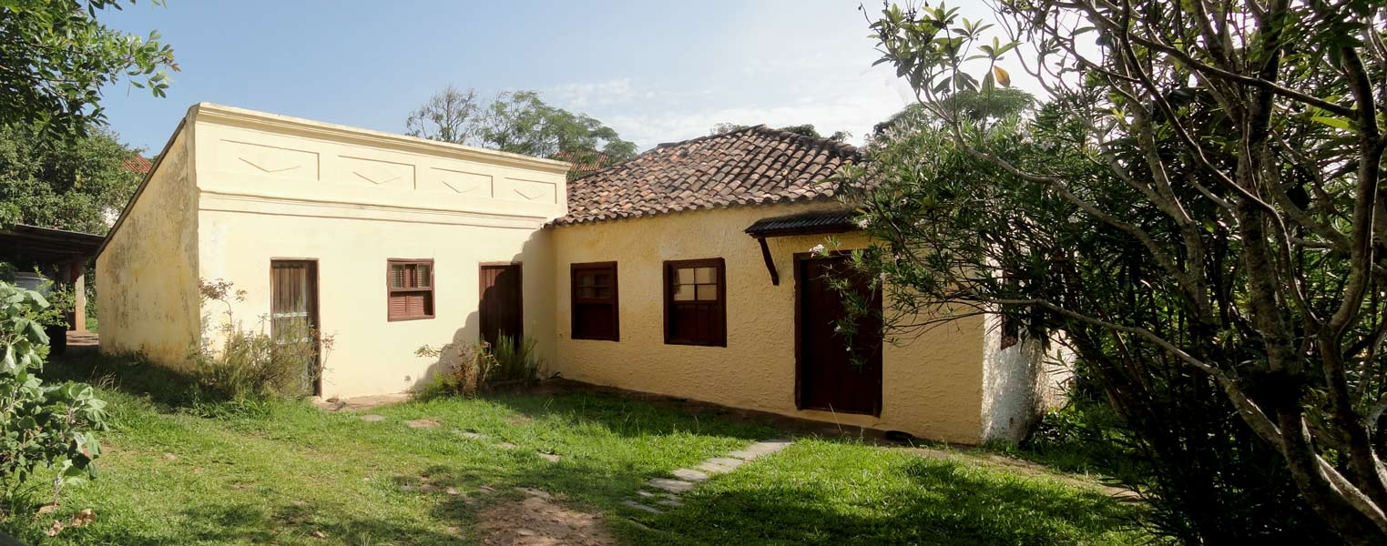 Casa 1, início do século XIX, a primeira residência de Torres. Hospedou o imperador Dom pedro I duas vezes.